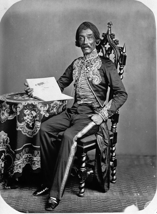 Portrait of Raden Saleh Sjarif Boestaman (1811-1880), Indonesian painter